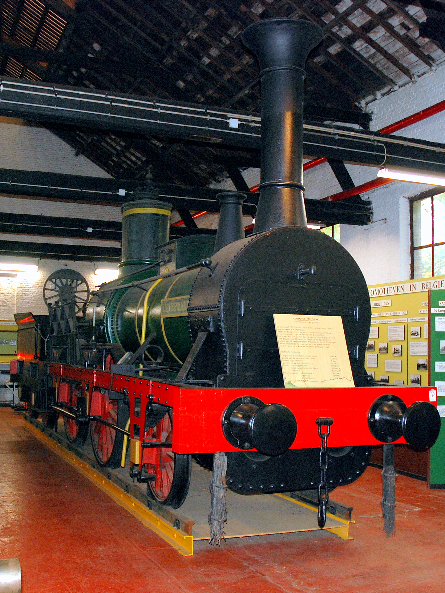 replica van de locomotief L'Eléphant uit 1834 in het Spoorwegmuseum de Mijlpaal te Mechelen, België